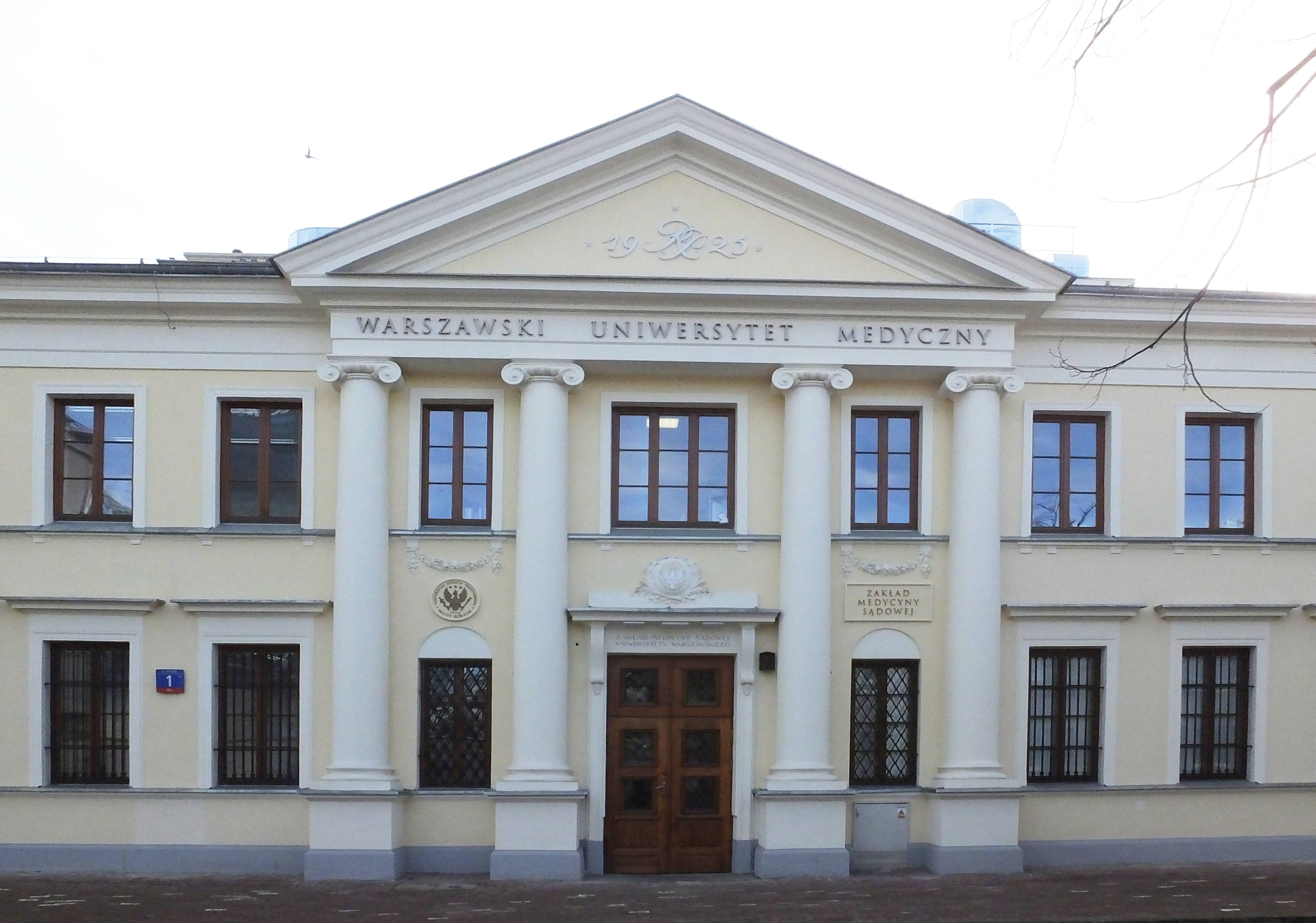 Zakład Medycyny Sądowej Warszawskiego Uniwersytetu Medycznego